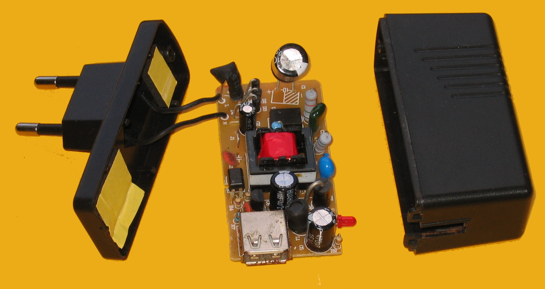 5V-2A Netzteil USB-Mobiltelefonlagegerät (Laderegler sind im Mobiltelefon bzw. Akkumulator)